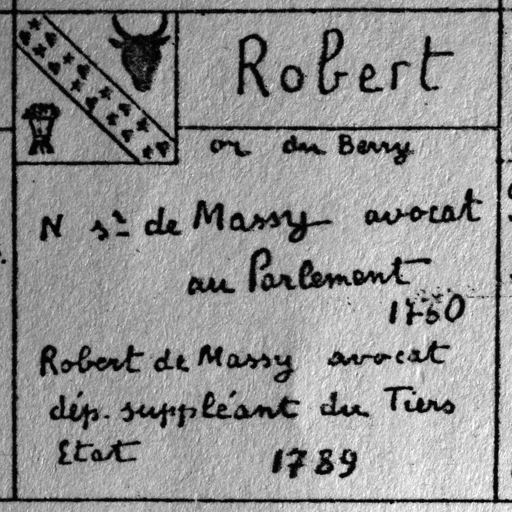 Armoiries Famille Robert de Massy